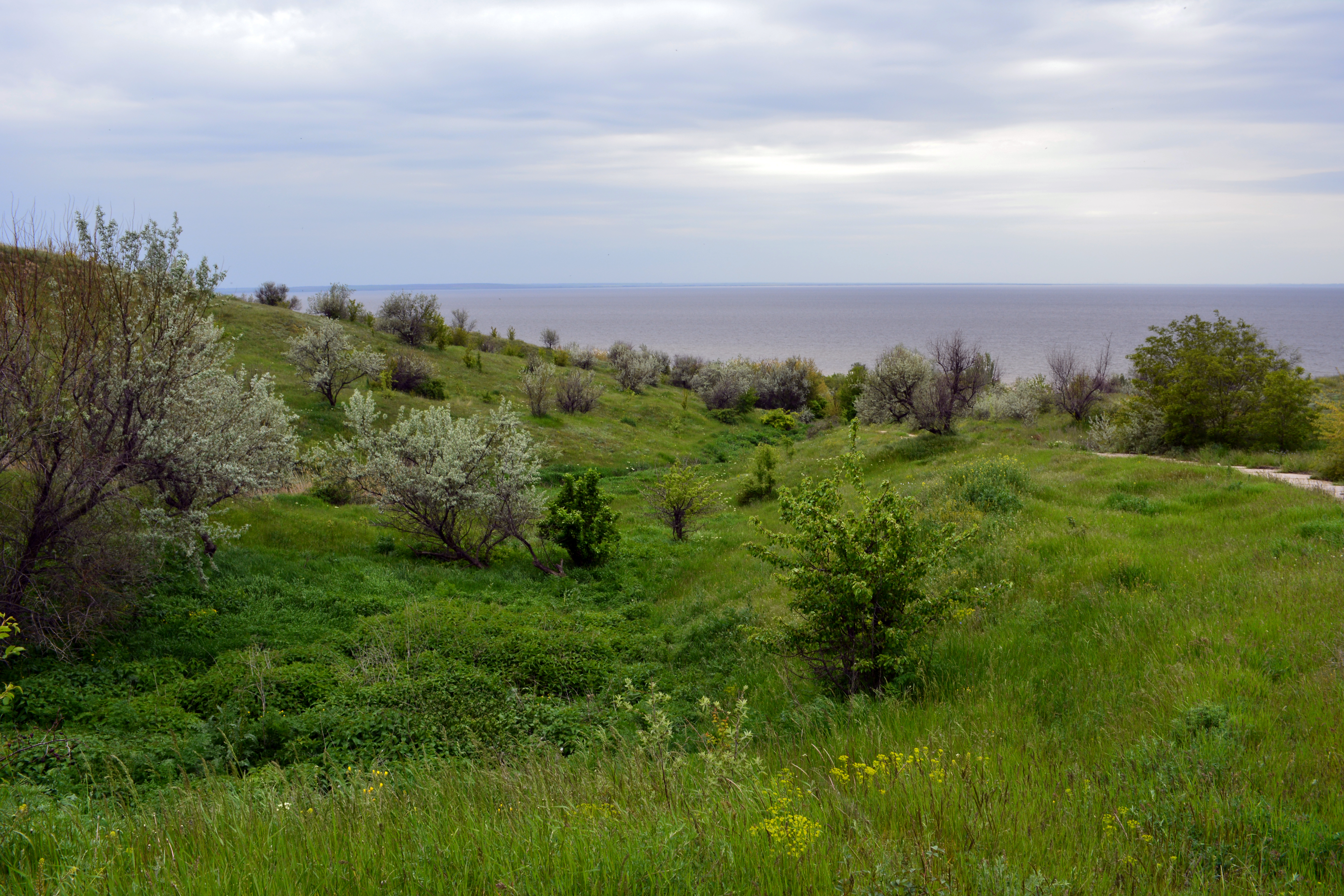 «Великий Луг», Василівський район, м. Дніпрорудне, с. Скельки, Маячка, акваторія Каховського водосховища